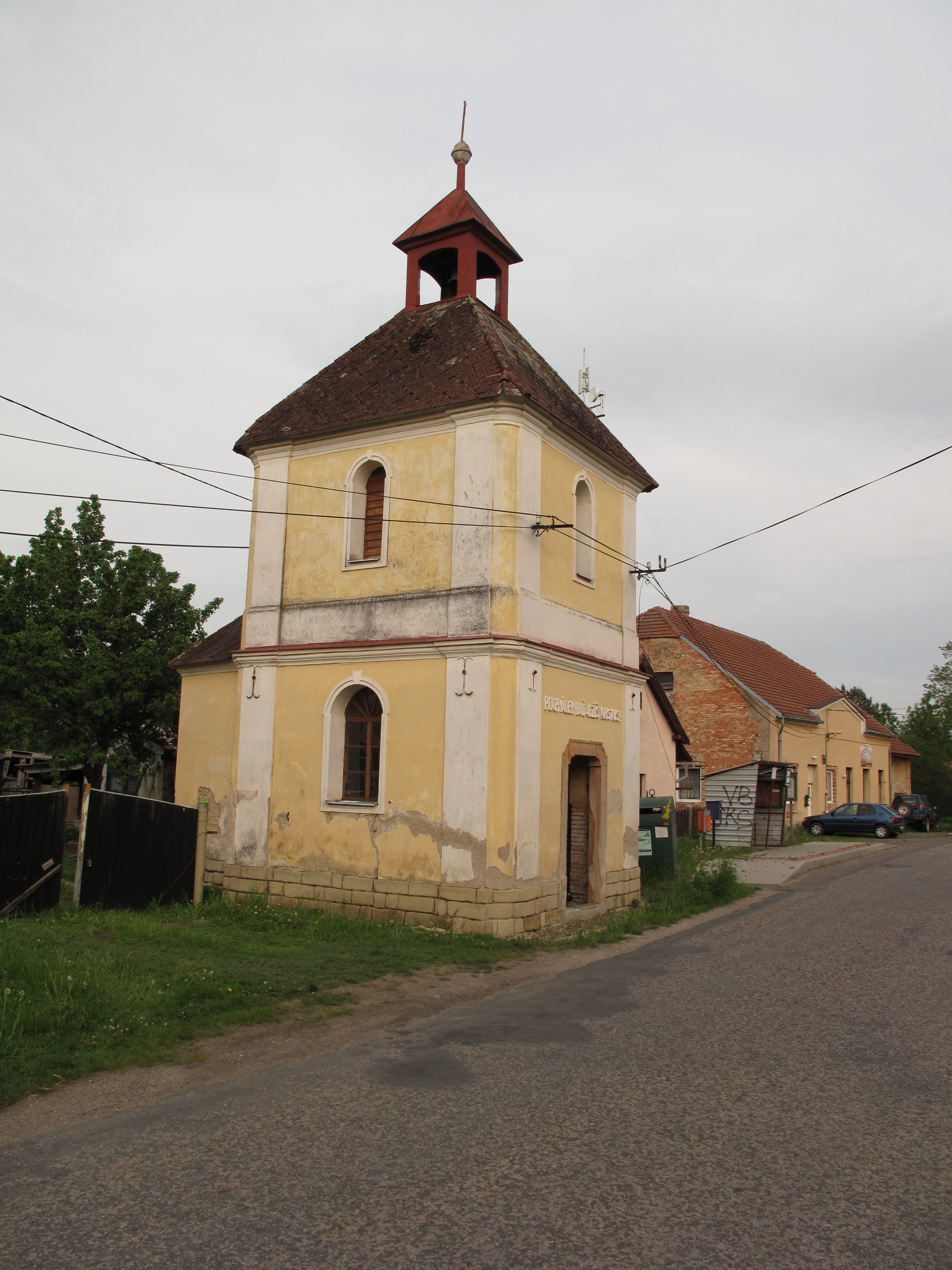 Kaplička v Podlužanech. Okres Nymburk, Česká republika.